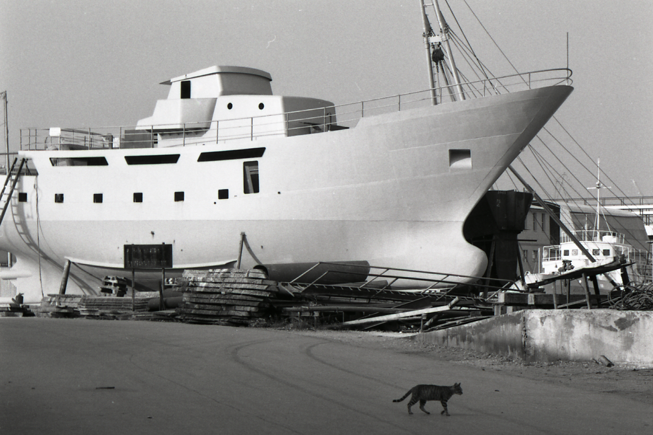 Serie fotografica : Ancona, 1969 / Paolo Monti. - Strisce: 7, Fotogrammi complessivi: 37 : Negativo b/n, gelatina bromuro d'argento/ pellicola ; 35 mm. - ((I fotogrammi hanno una doppia numerazione. . - Sul portanegativi: Nikon FP4. - Sul dorso del portanegativi Monti specifica: "Porto, navi, paesaggi, rottami, riflessi, ecc. - Occasione: Documentazione per la pubblicazione: "TOURING CLUB ITALIANO, Marche, Milano, TCI, 1971". - Fonte: Agenda di Paolo Monti: Monti/ 3 aprile 1966 - 9 marzo 1971/ 12421-16823 (1966-1971), presso Archivio Paolo Monti. - Fonte: Monografia: TOURING CLUB ITALIANO, Marche, Milano, TCI, 1971 (1971). - Fonte: Agenda di Paolo Monti: Monti - Agenda 1969 (1969), presso Archivio Paolo Monti